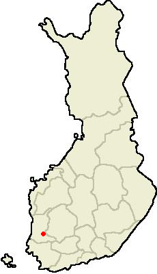 Kokemäen sijainti